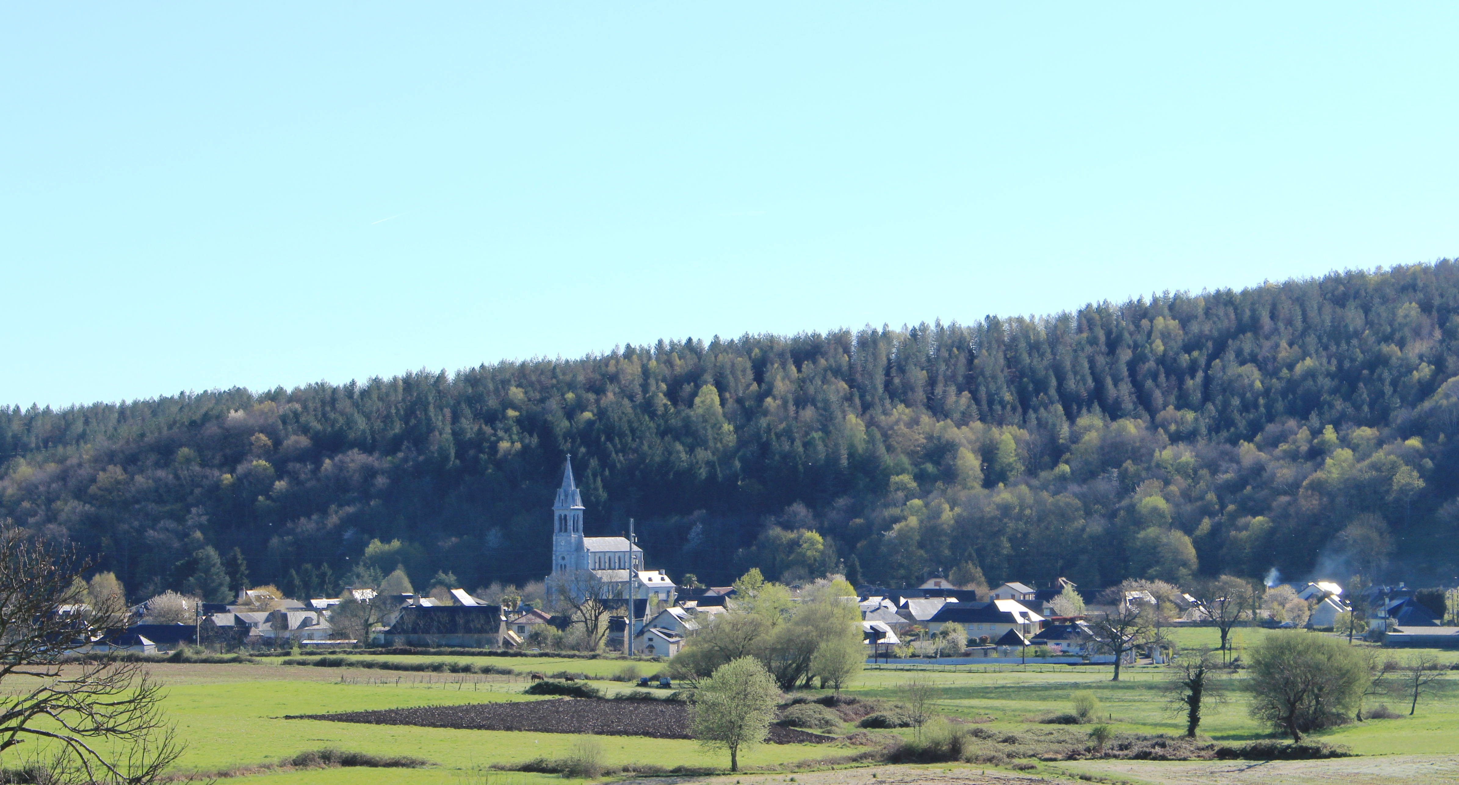 Adé (Hautes-Pyrénées)